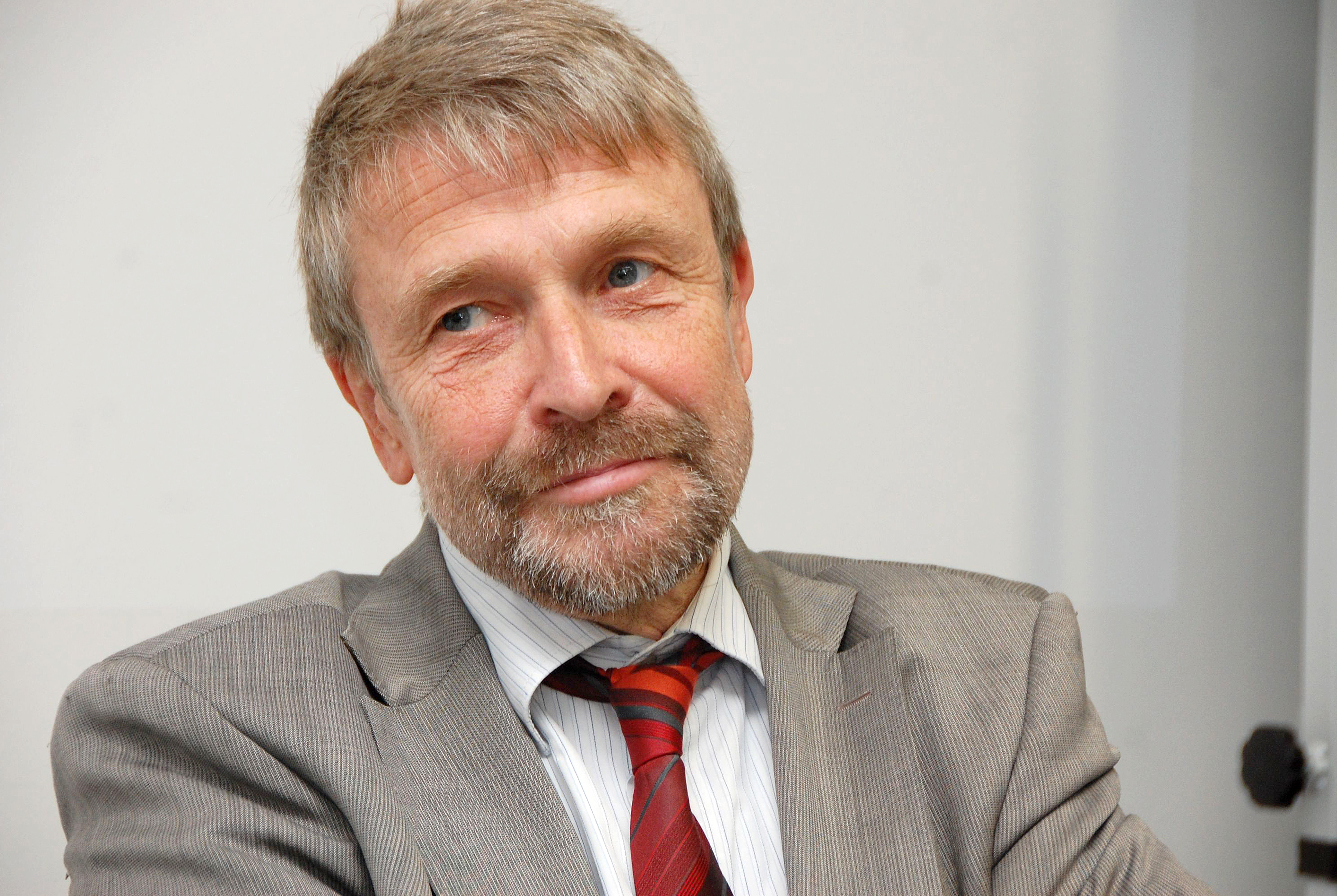 Bild des Direktors Uwe Danker des IZRG ( Institut für schleswig-holsteinische Zeit- und Regionalgeschichte) in Schleswig, Deutschland